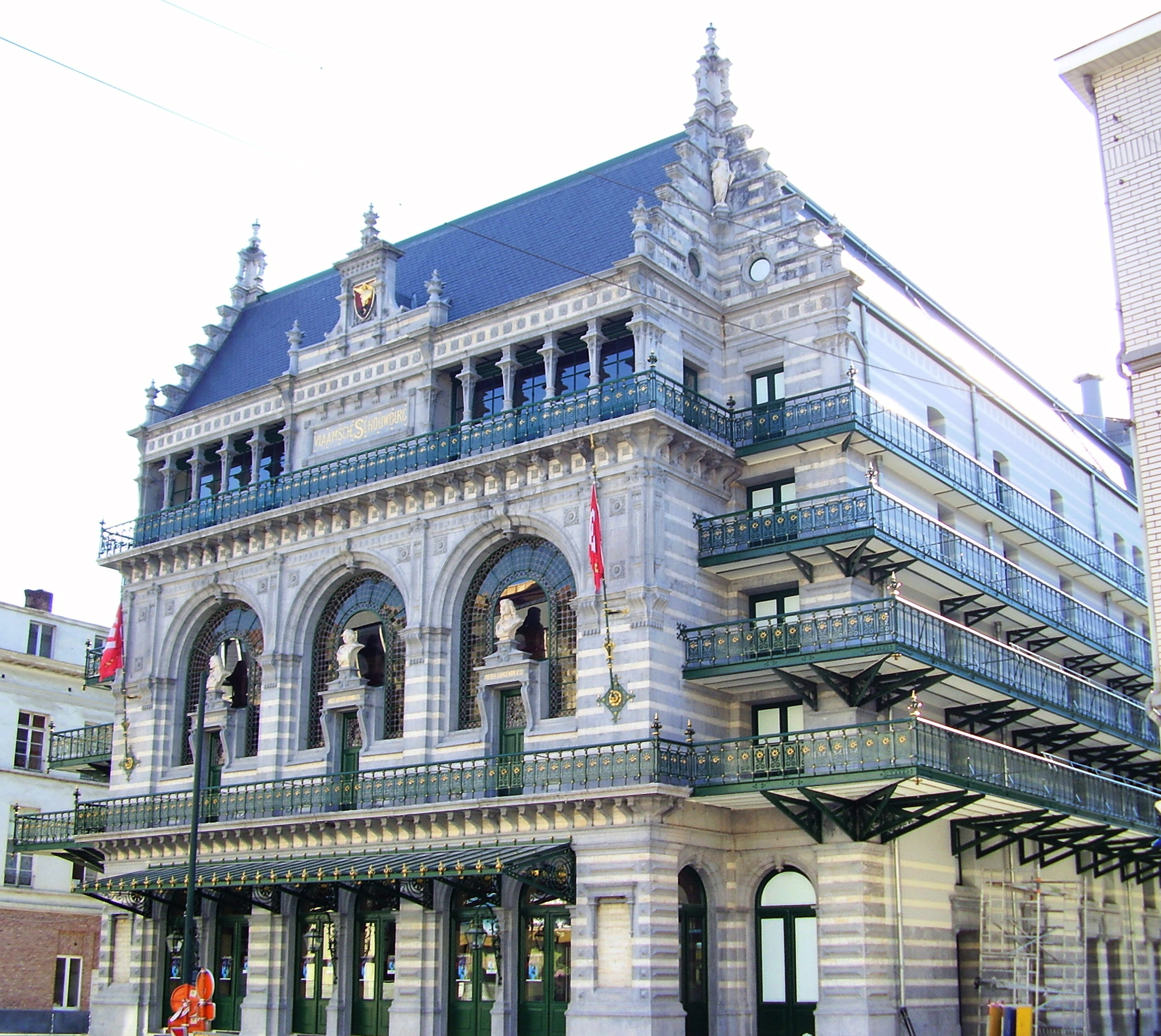 Théâtre Royal Flamand (Bruxelles) - Façade principale, 06 juin 2006